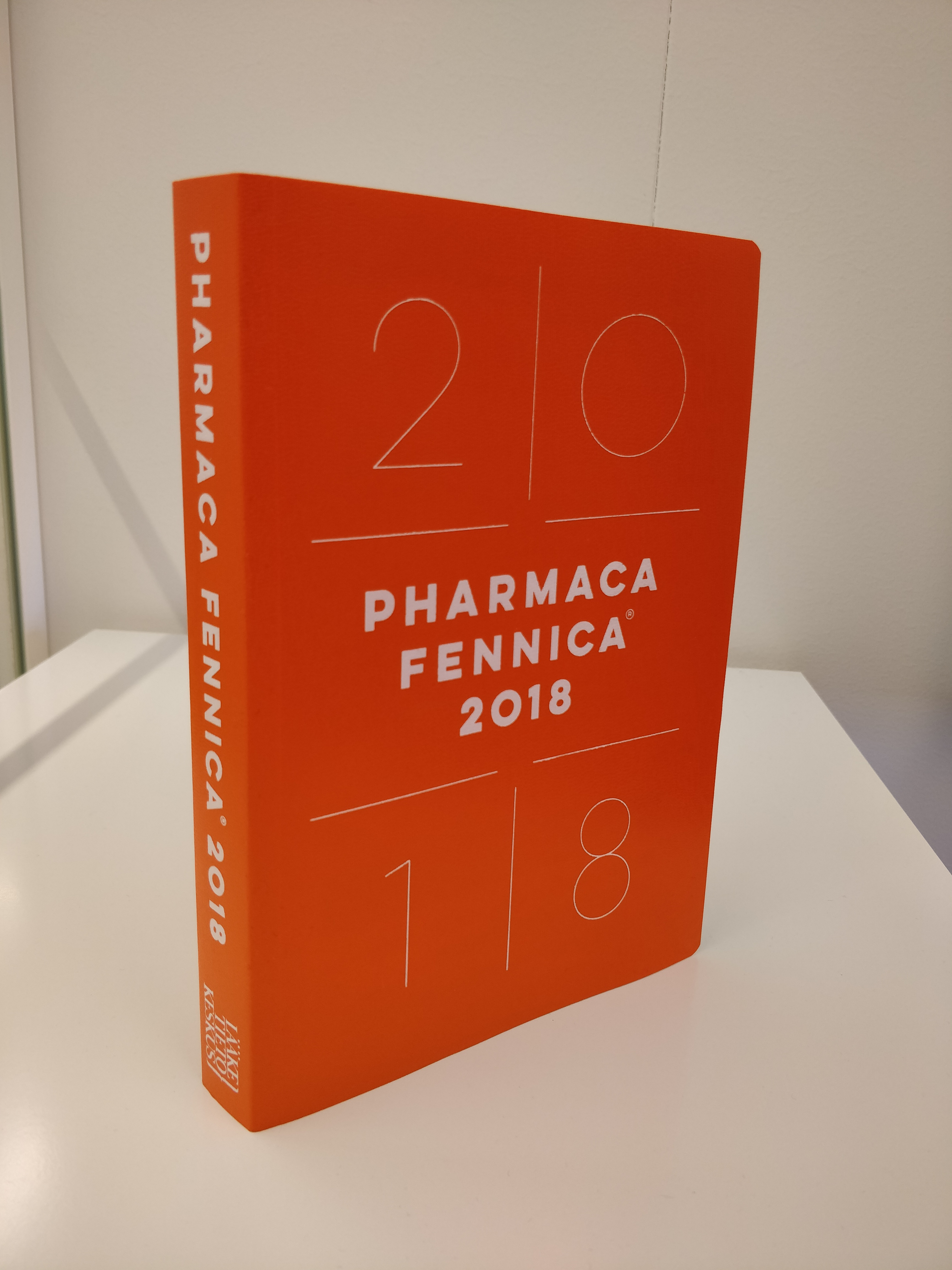 Pharmaca Fennica 2018 painos